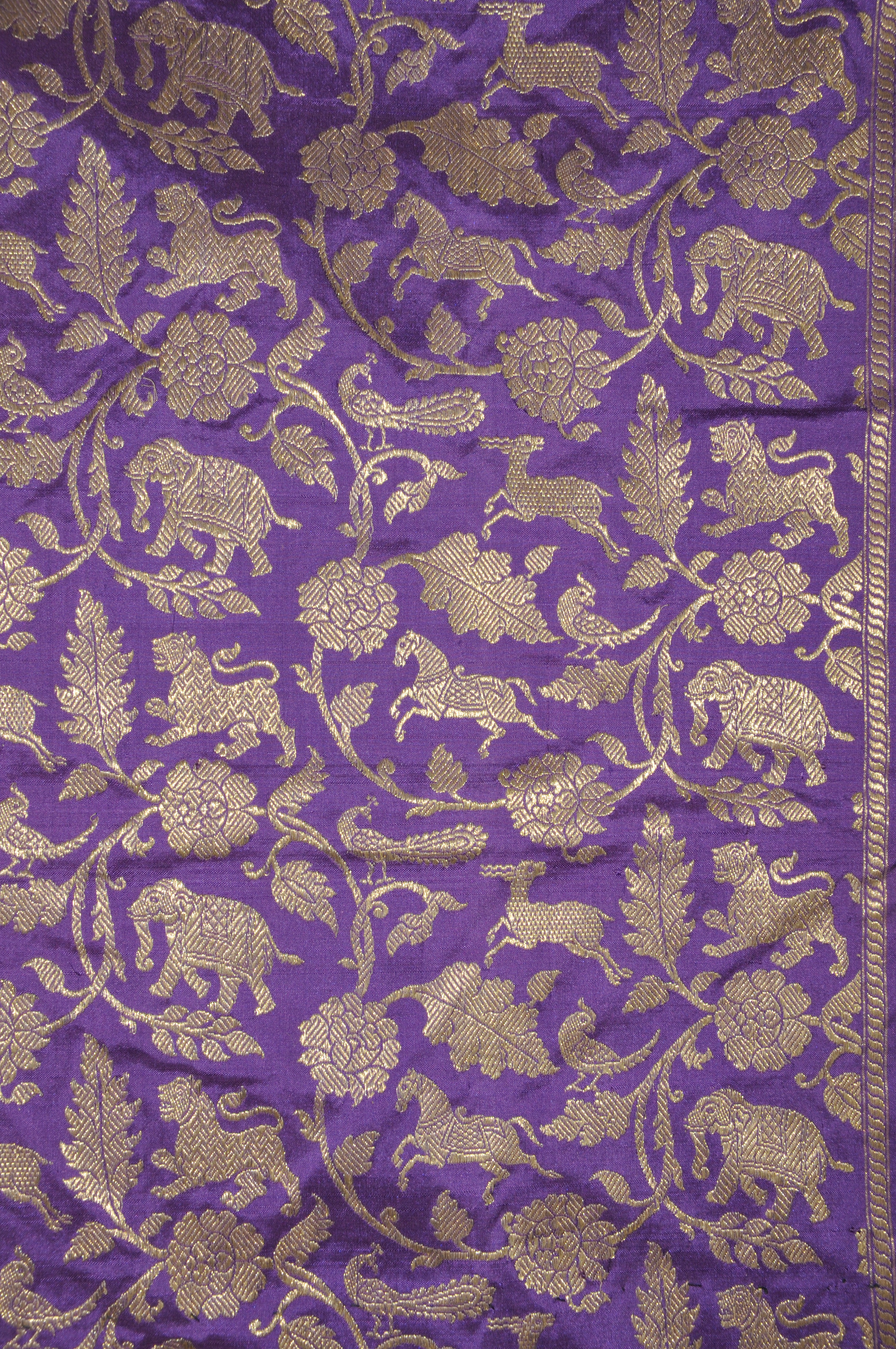 बनारसी साड़ी